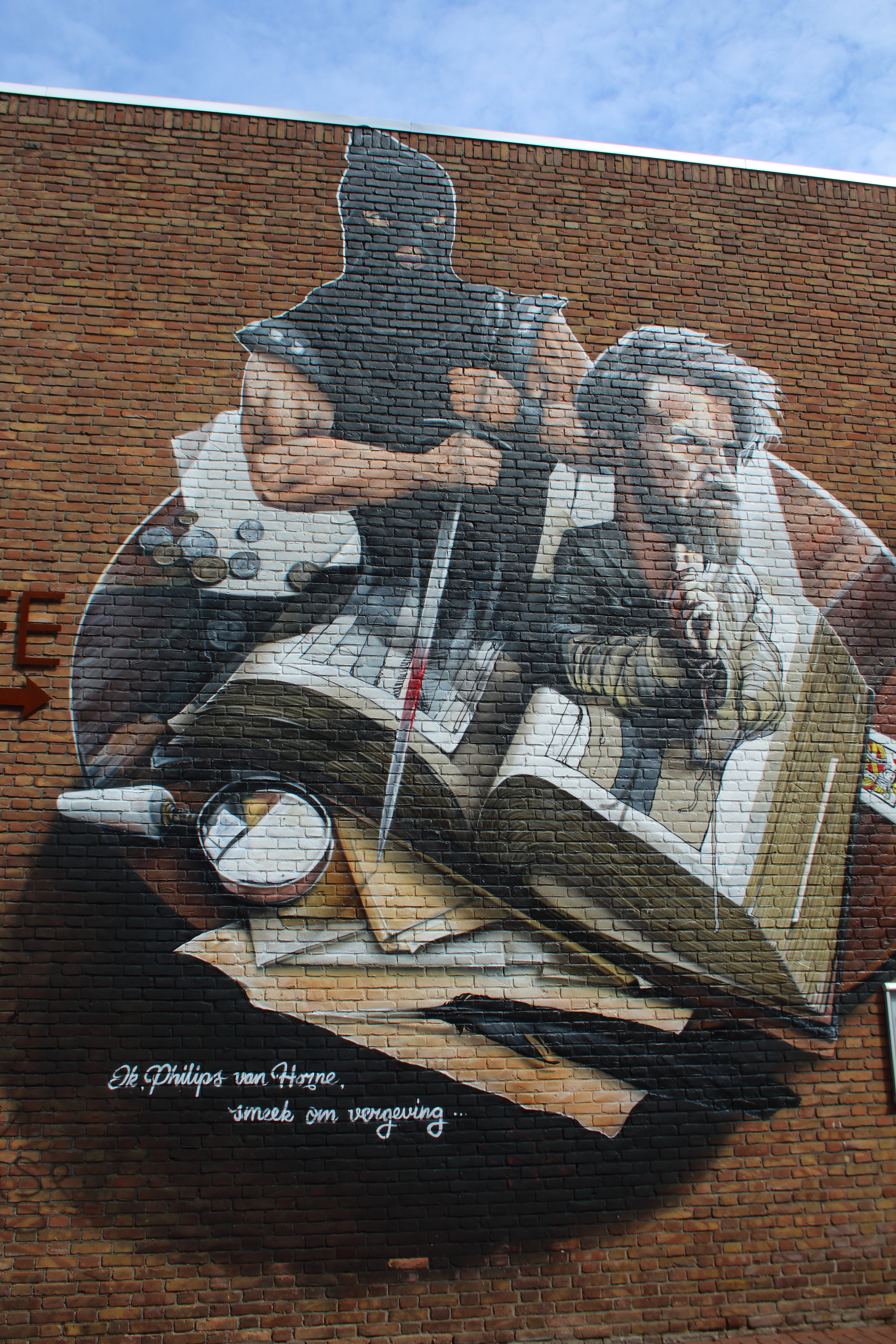 Muurschildering 'de onthoofding van Philips van Horne', Weert, Limburg, Nederland